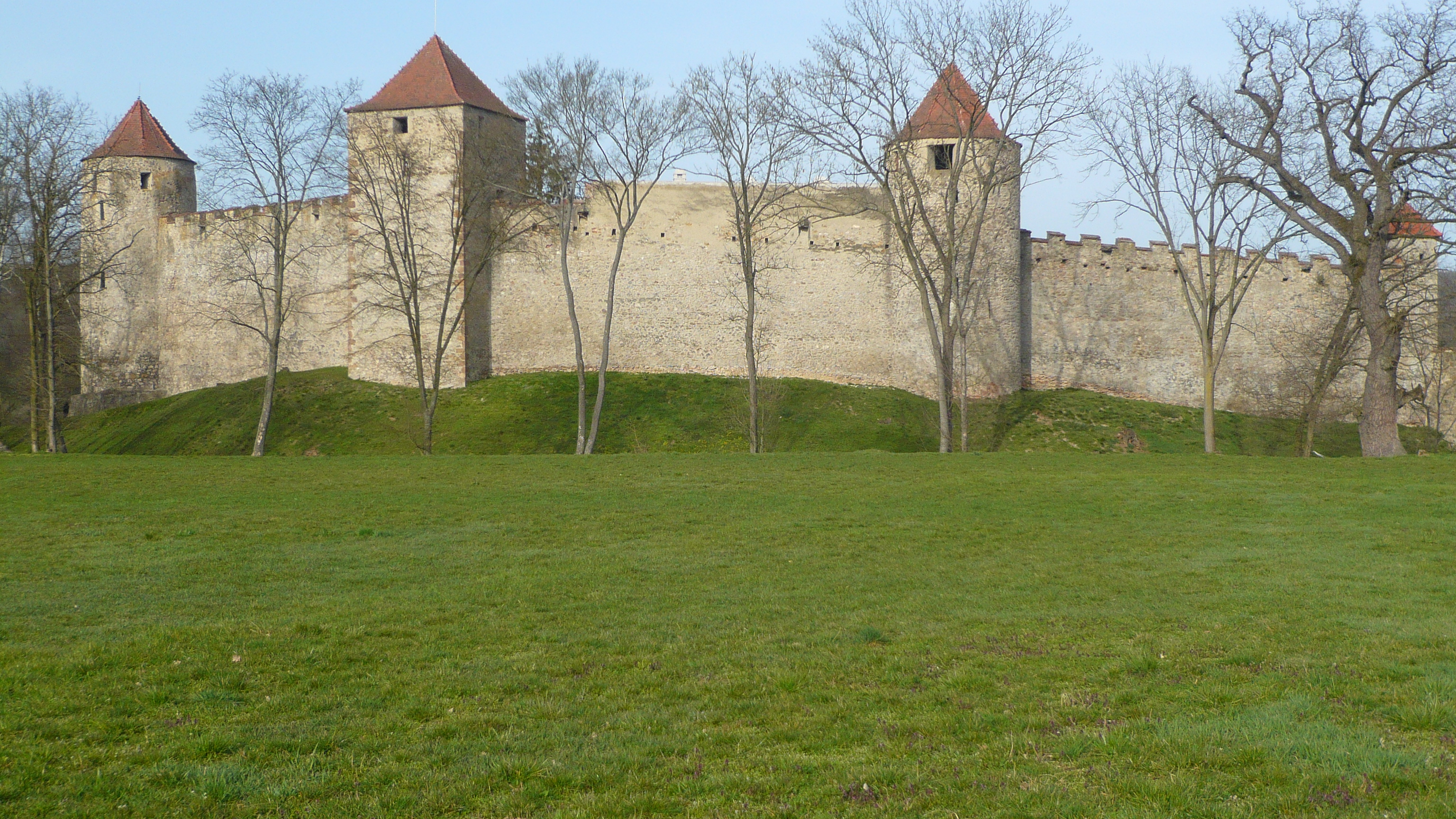 Hrad Veveří, nové hradby - vrcholná gotika (Lucemburský dvůr). Pohled k východu